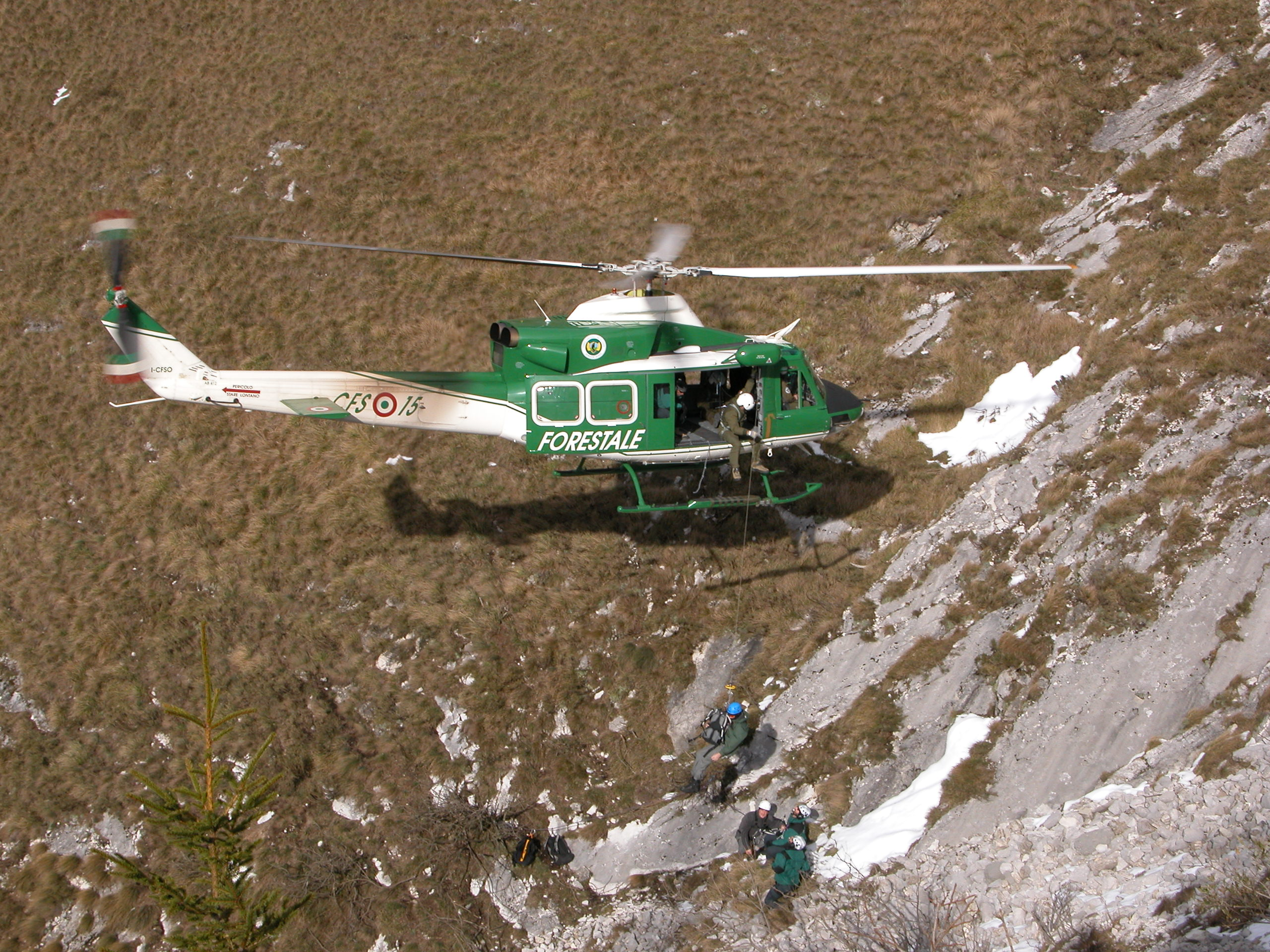 Un Agusta-Bell AB 412 (I-CFSO / CFS-15) del Corpo Forestale dello Stato durante una esercitazione di salvataggio. fotografia di una calata col verricello di soccorso eseguita per addestramento. autore paolo elli.